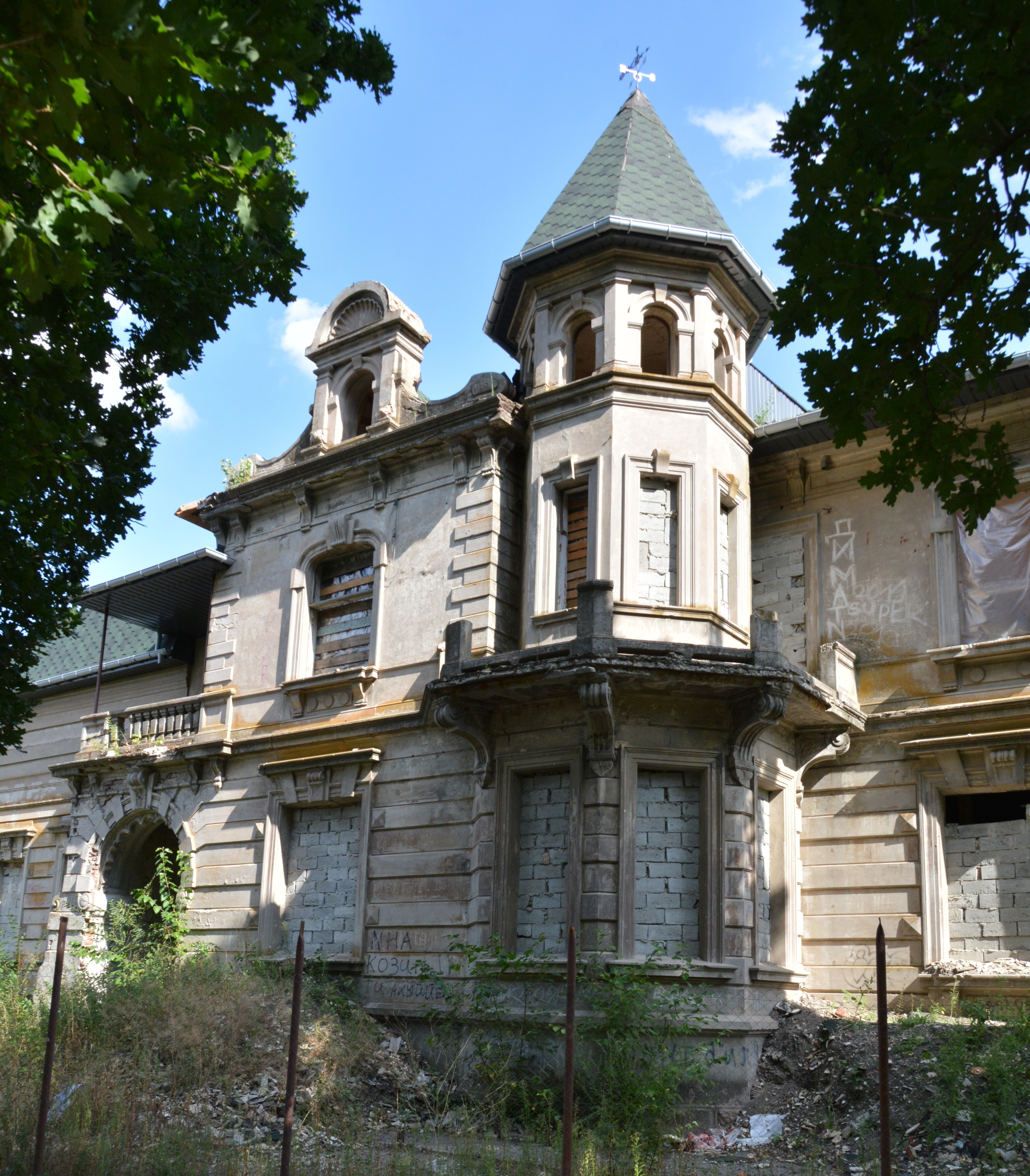 Палац Шредера, Молочанськ, вул. Р. Люксембург, 22